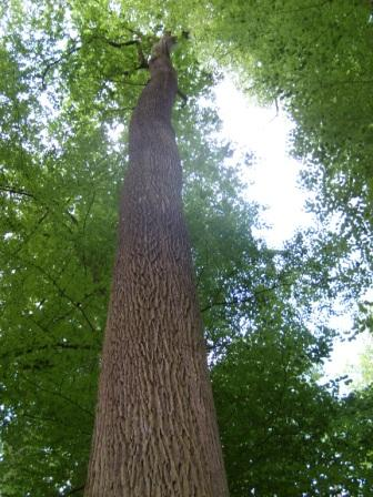 ek